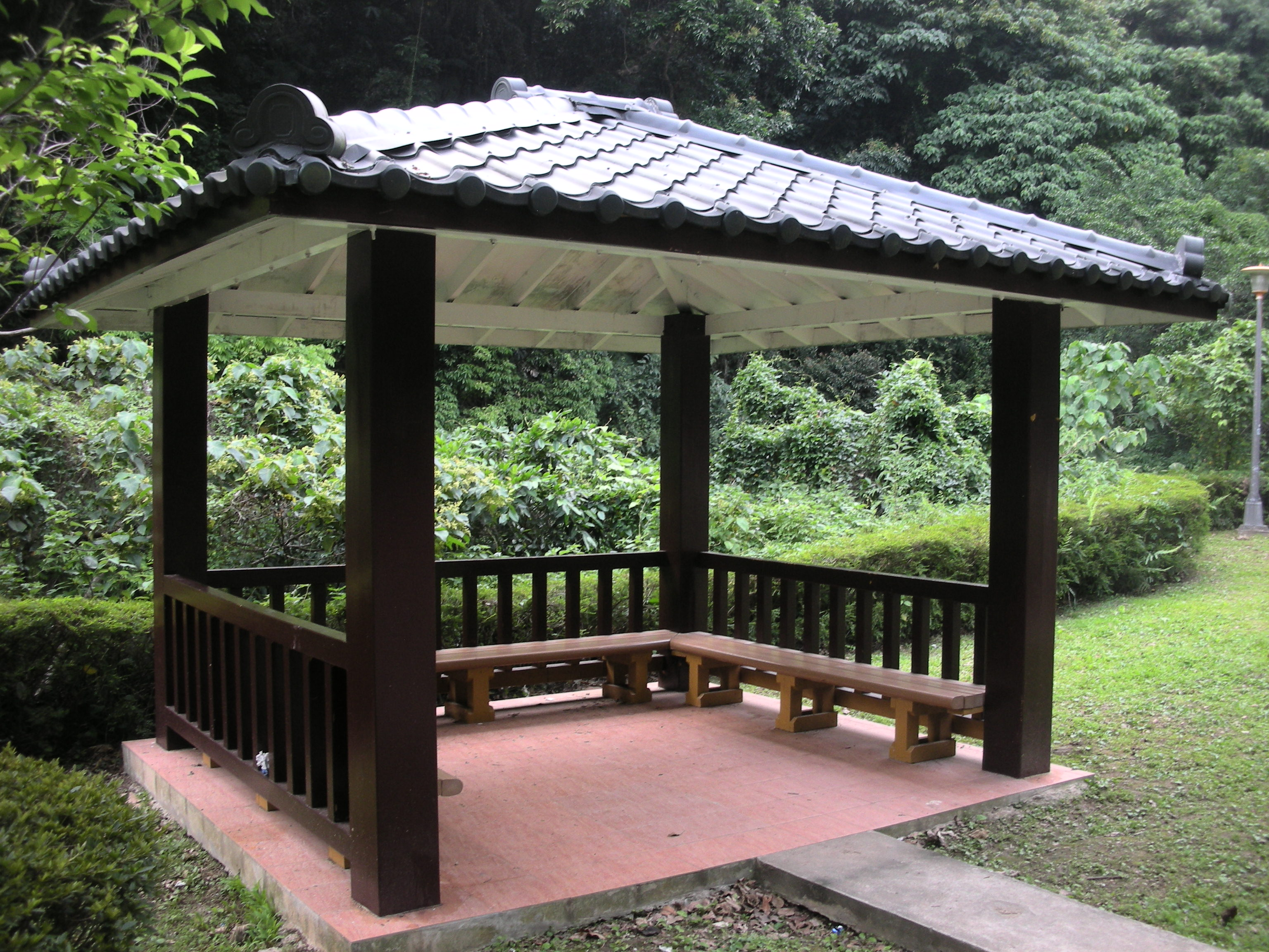 天母公園Tianmu Park